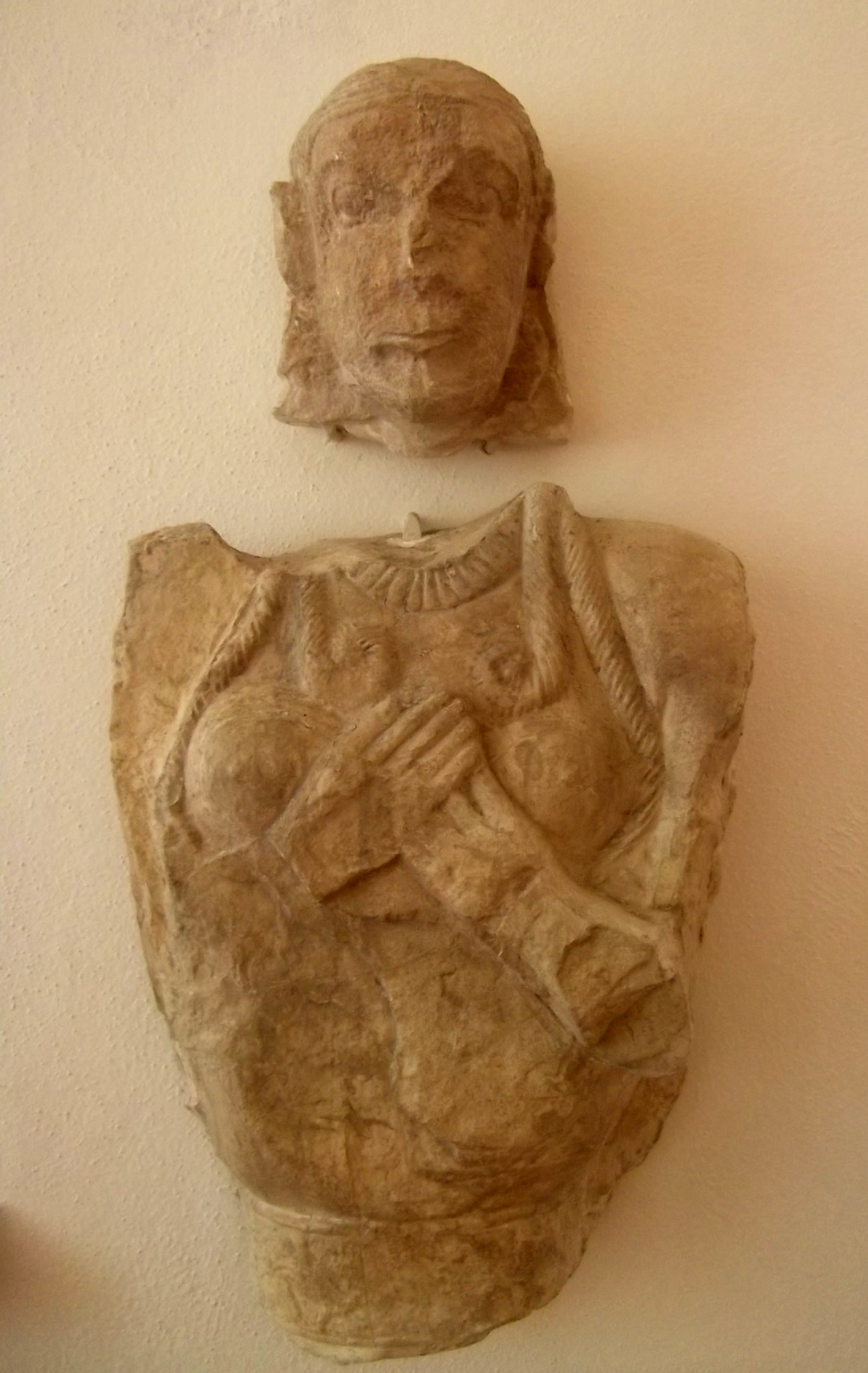 weibliche Steinstatue, 7. Jh. v. Chr., Archäologisches Museum Grosseto